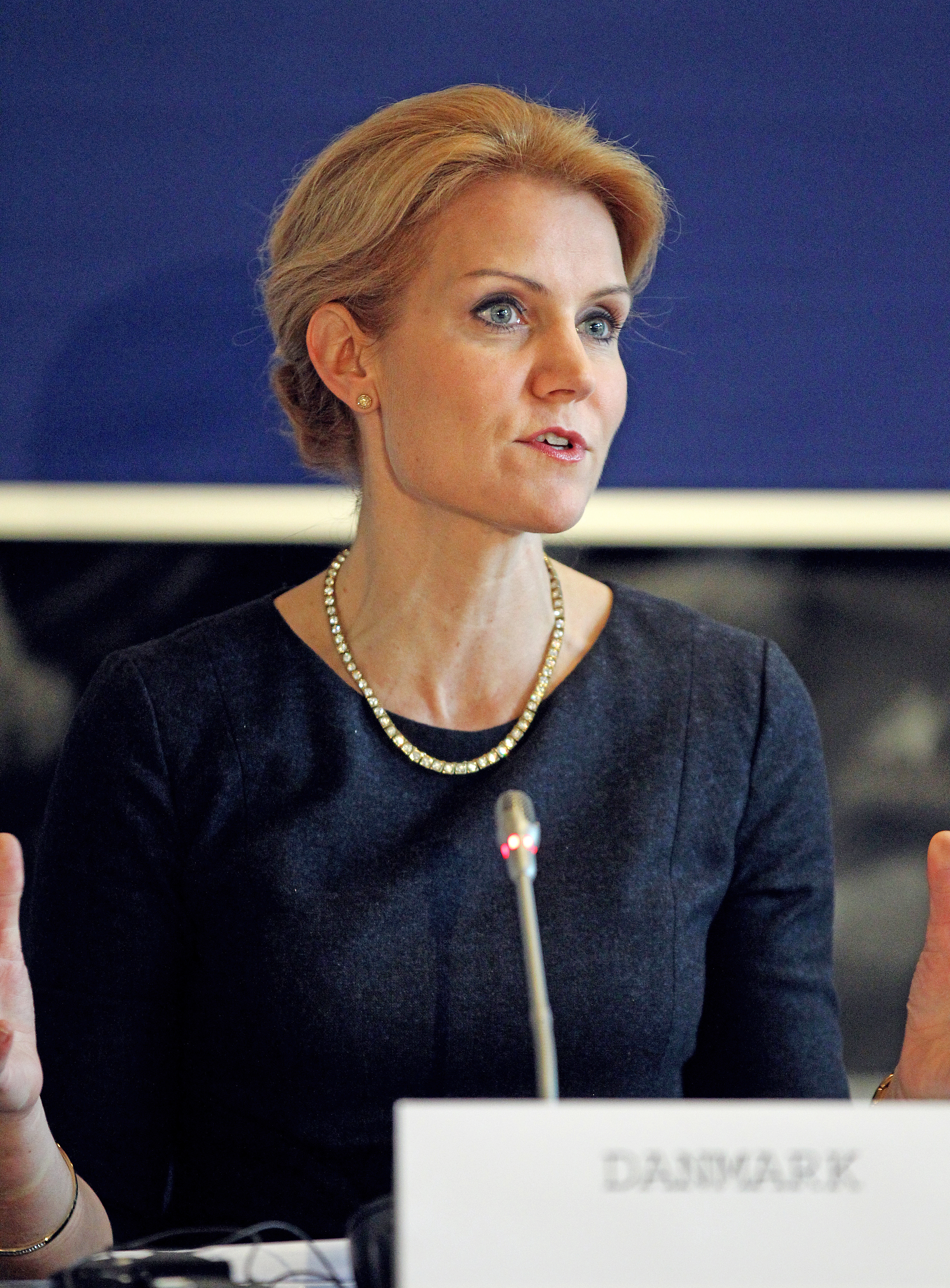 Danmarks statsminister Helle Thorning-Schmidt vid de nordiska statsministrarnas möte vid Nordiska Rådets session i Köpenhamn.